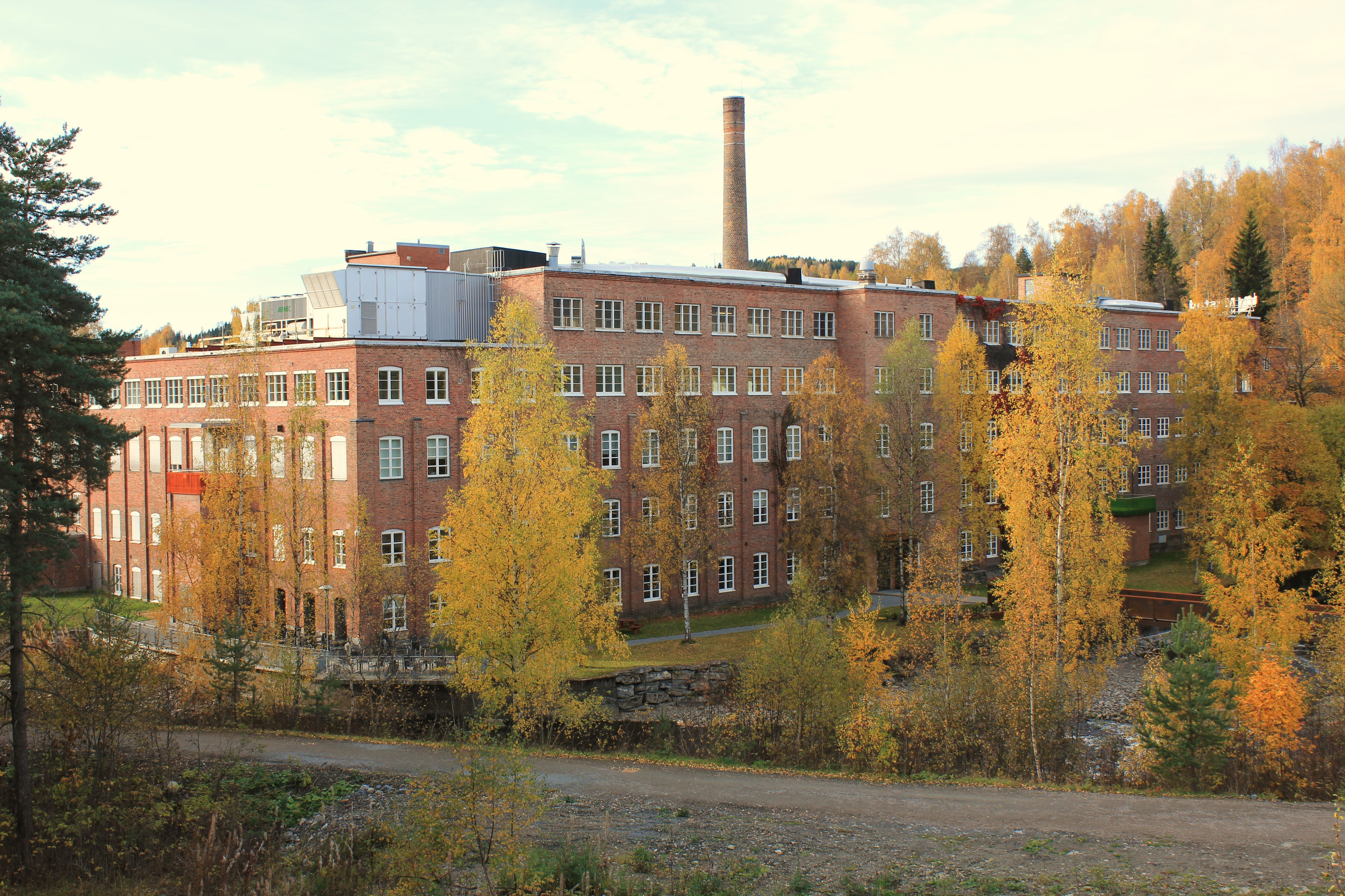 Mustad fabrikkanlegg eller næringshage ved Gjøvik.